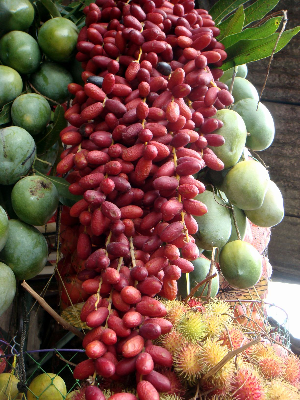 കേരളത്തിലെ ഒരു വില്പന ശാലയിൽ